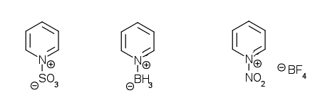 pyridine complex